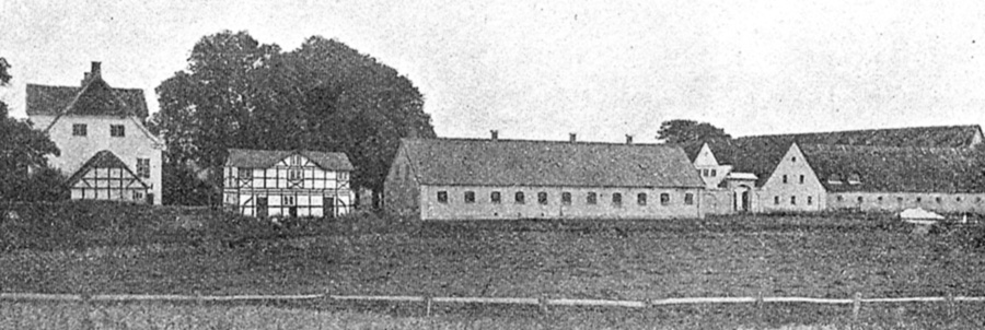 Hindemae er en gammel hovedgård, som nævnes første gang i 1480. Gården ligger i Skellerup Sogn, Vindinge Herred, Ullerslev Kommune. Hovedbygningen er opført i 1787-1790.